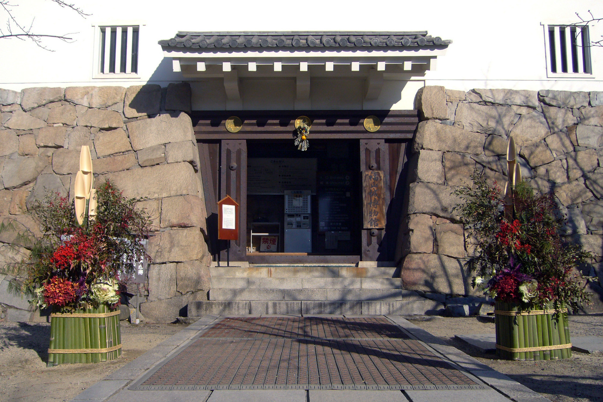 Fukuyama Castle "Tsukimi-yagura" in Fukuyama, Hiroshima prefecture, Japan